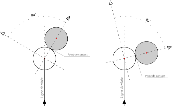 Billard - Schema d'éclatement naturel - Travail personnel, libre de droit